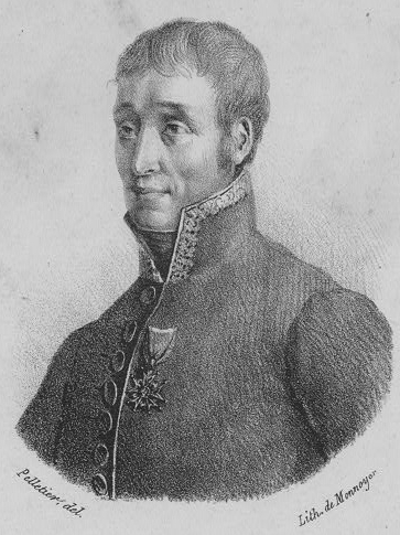 French scientist Jean-Marie-Joseph Coutelle (1748-1835). "Le colonel Coutelle, chef des aérostiers en 1794."